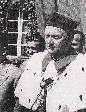 Antoni Opolski (ur. 1913), fizyk, rektor WSP w Opolu (1959-1961)